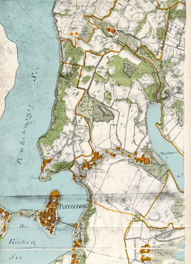 Karte von Ratzeburg im Ratzeburger See mit dem angrenzenden Teil des Fürstentum Ratzeburg, heute Landkreis Nordwestmecklenburg.